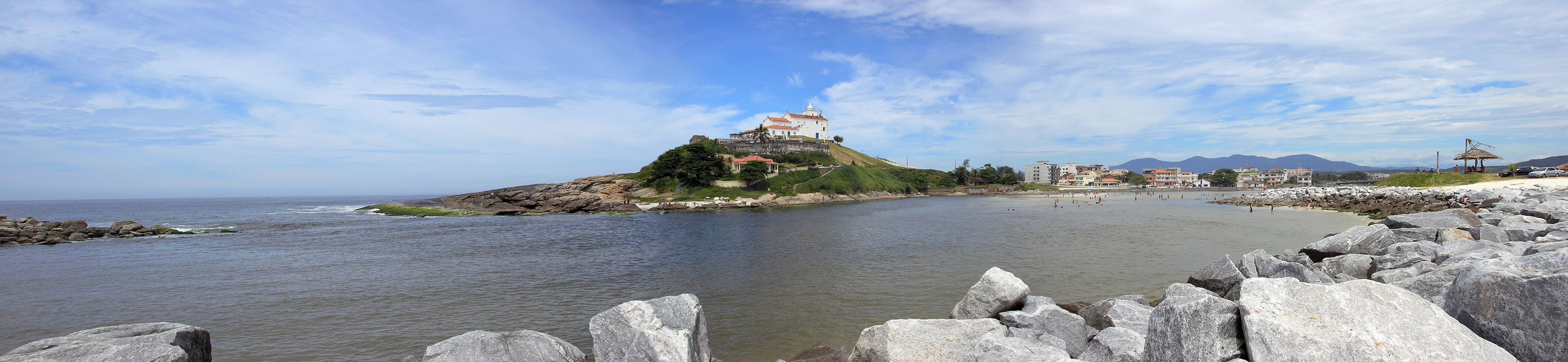 Igreja-Saquarema